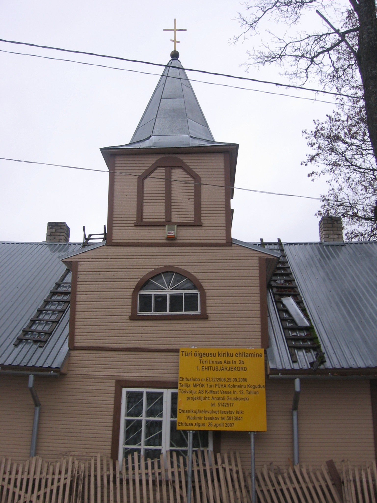 Kiriku esiplaan enne lammutamist, näha on ka ehitusloa silt.